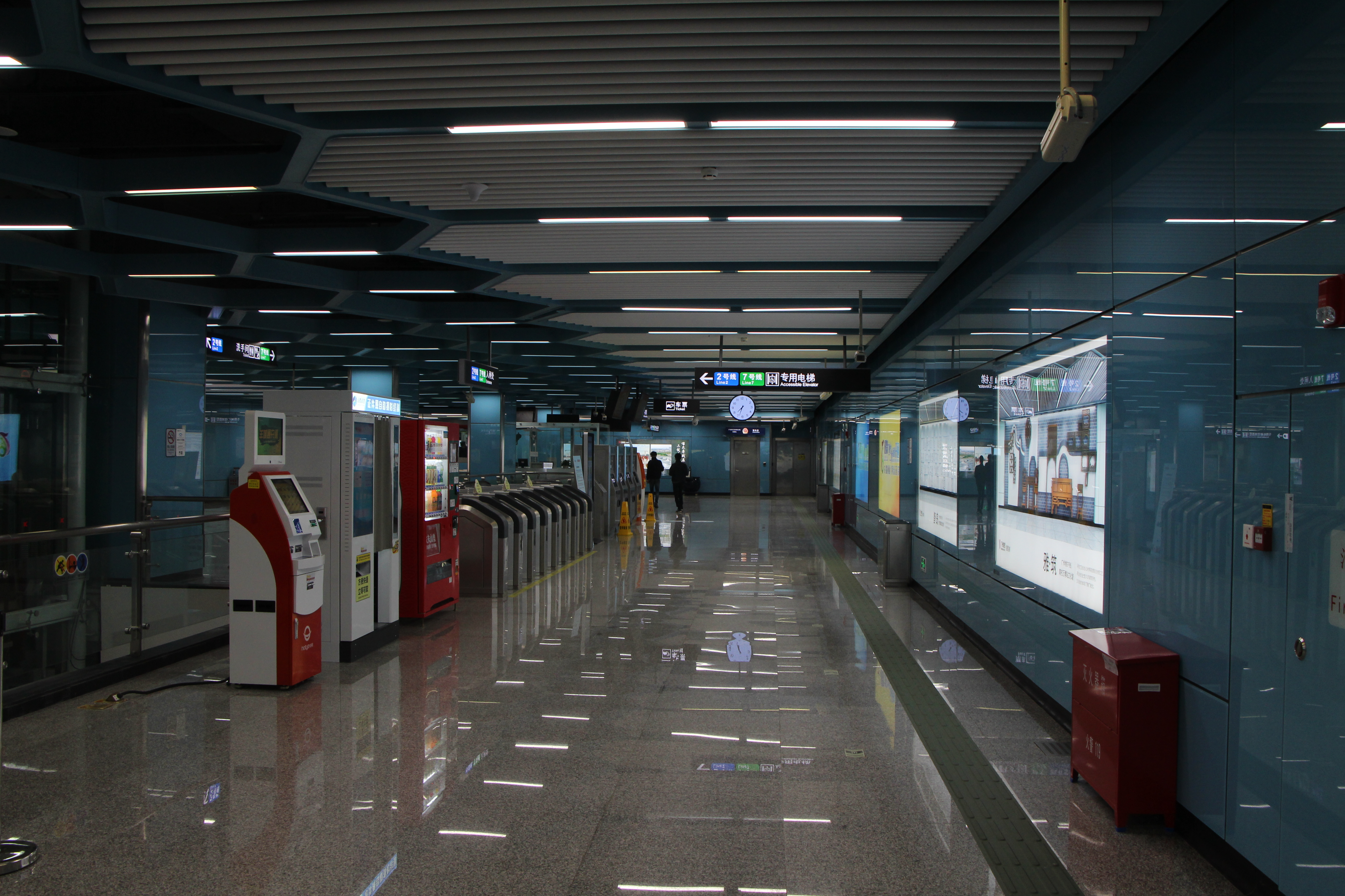 广州地铁石壁站